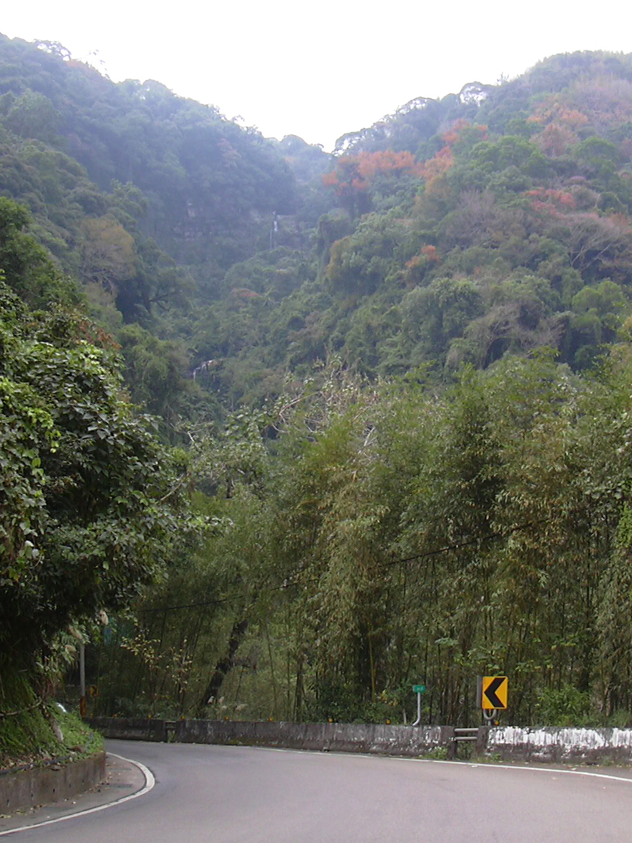 於北部橫貫公路遠眺高坡瀑布